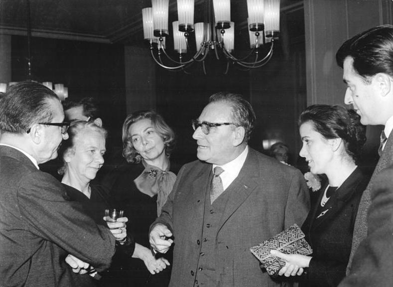 Zentralbild-Hochneder Ge-Pr 9.10.1963 VII. Berliner Festtage 1963 Einen Empfang ... zu Ehren der Gäste des Piraikon Theatron Athen gab am Abend des 8.10.1963 der Stellvertreter des Ministers für Kultur, Günter Witt, im Gästehaus der Regierung in Berlin. Anwesend waren außerdem Schauspieler des Deutschen Theaters und Intendant Prof. Wolfgang Heinz. UBz. Prof. Wolfgang Heinz (3.v.r.) in angeregter Unterhaltung mit Prof. Dimitrios Rondiris, Direktor des Piraikon Theatron Athen, Mathilde Danegger (Deutsches Theater), Erika Pelikowski (Deutsches Theater) und A. Papathanassiou vom Piraikon Theatron Athen (v.l.n.r.).